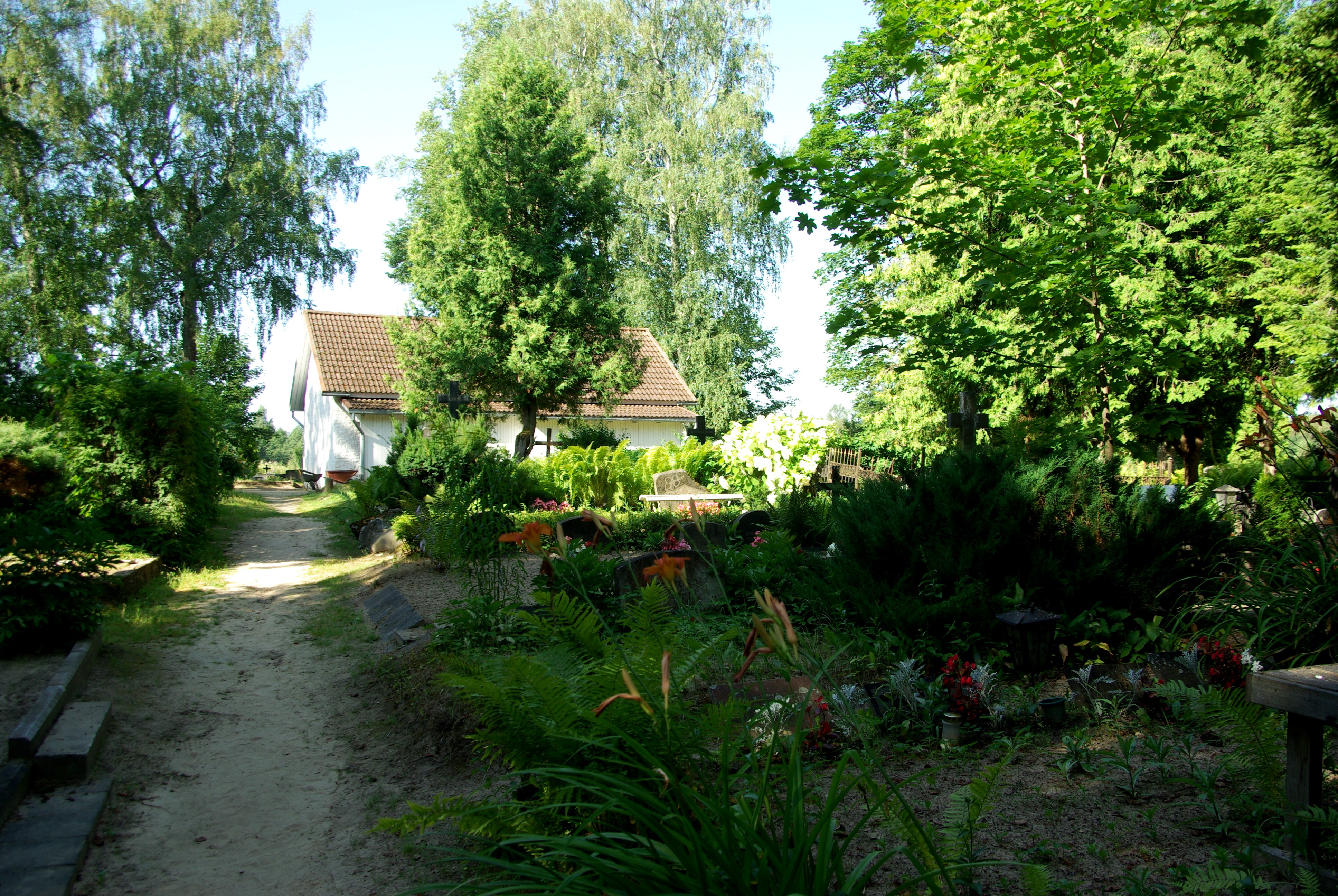 Äksi kalmistu